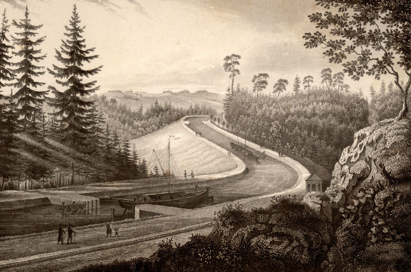 Der Distellochdamm von oben angesehn. Stahlstich von Alexander Marx aus dem Buch Pittoreske Ansichten des Ludwig-Donau-Main-Kanals. Gezeichnet, auf Stahl gestochen und herausgegeben von Alexander Marx. 1845. Kupferstecher in Nürnberg. Das Bild zeigt den Distellochdamm in der Gemeinde Burgthann.